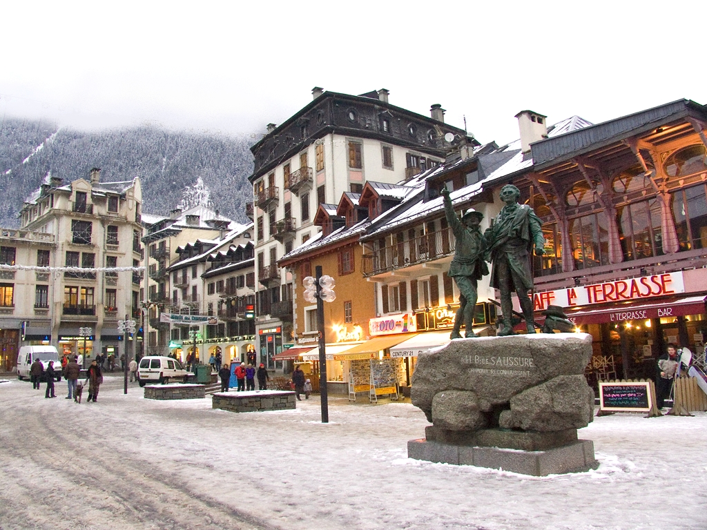 Le centre ville de Chamonix en hiver avec au premier plan la statue de H.-B. de Saussure